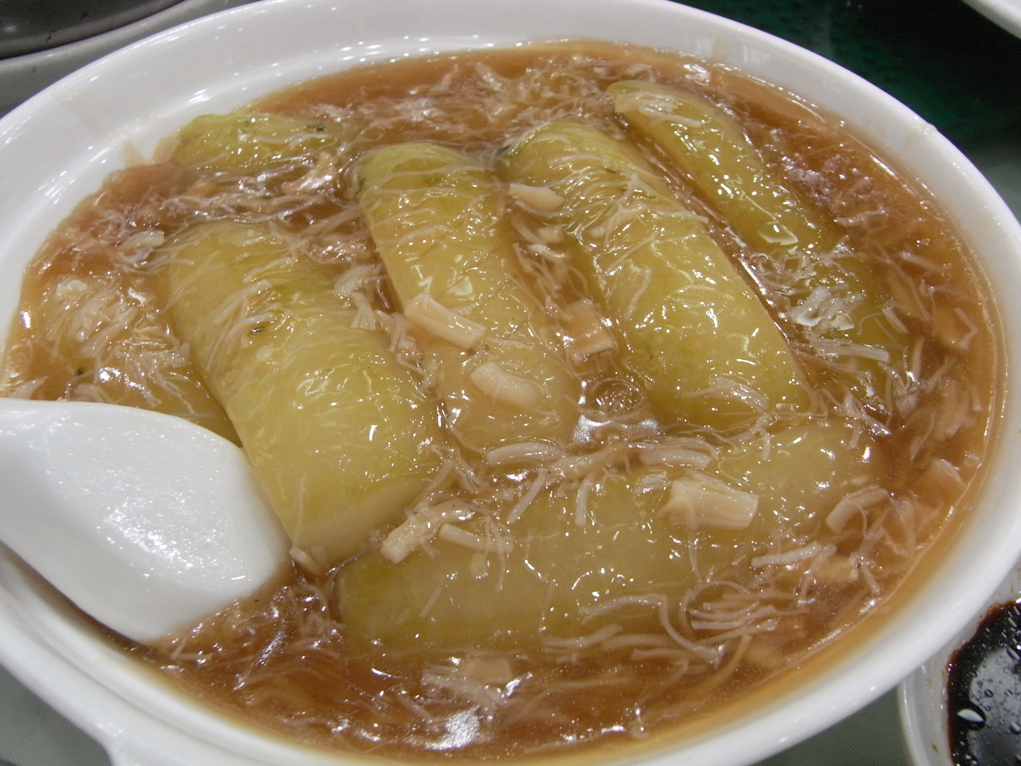 中文（香港）: 深圳 餐廳 節瓜